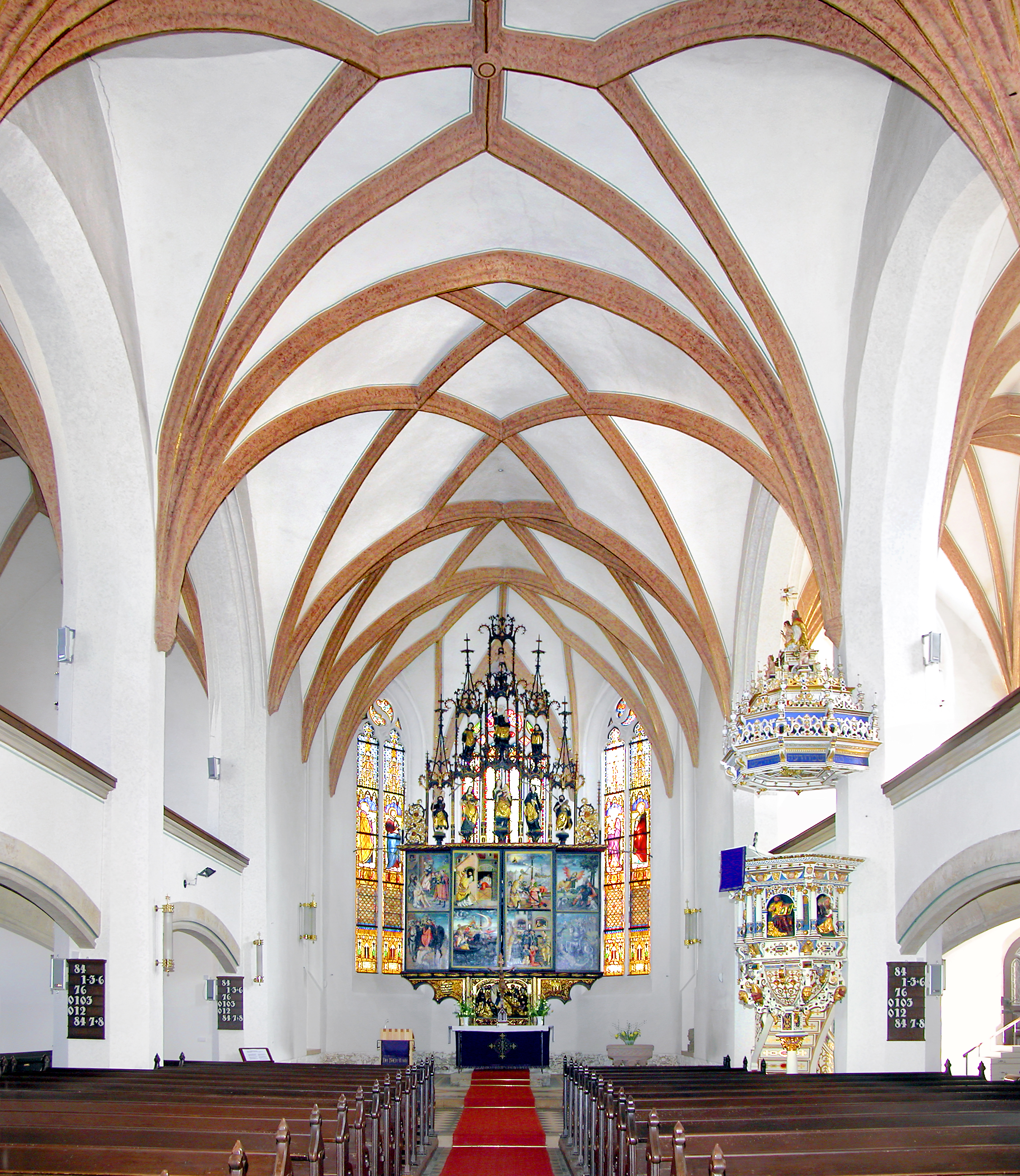 02.04.2009 04720 Döbeln: Nicolaikirche (1479-1485), innen zum Flügelaltar (1515/16). Holzkanzel (1599, David Schatz). [DSCN35925-35927.TIF]20090402255MDR.JPG(c)Blobelt